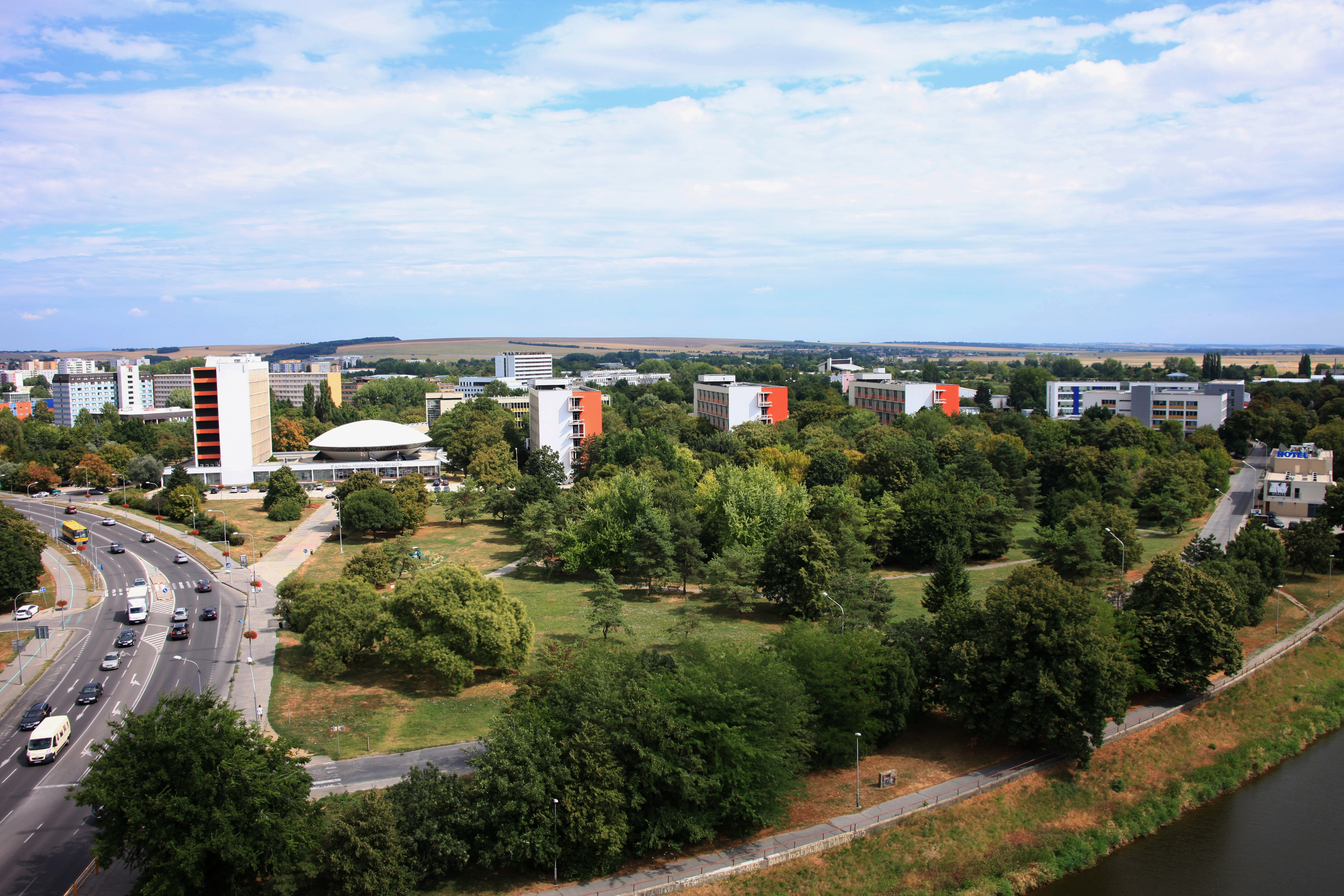 Areál Slovenskej poľnohospodárskej univerzity v Nitre